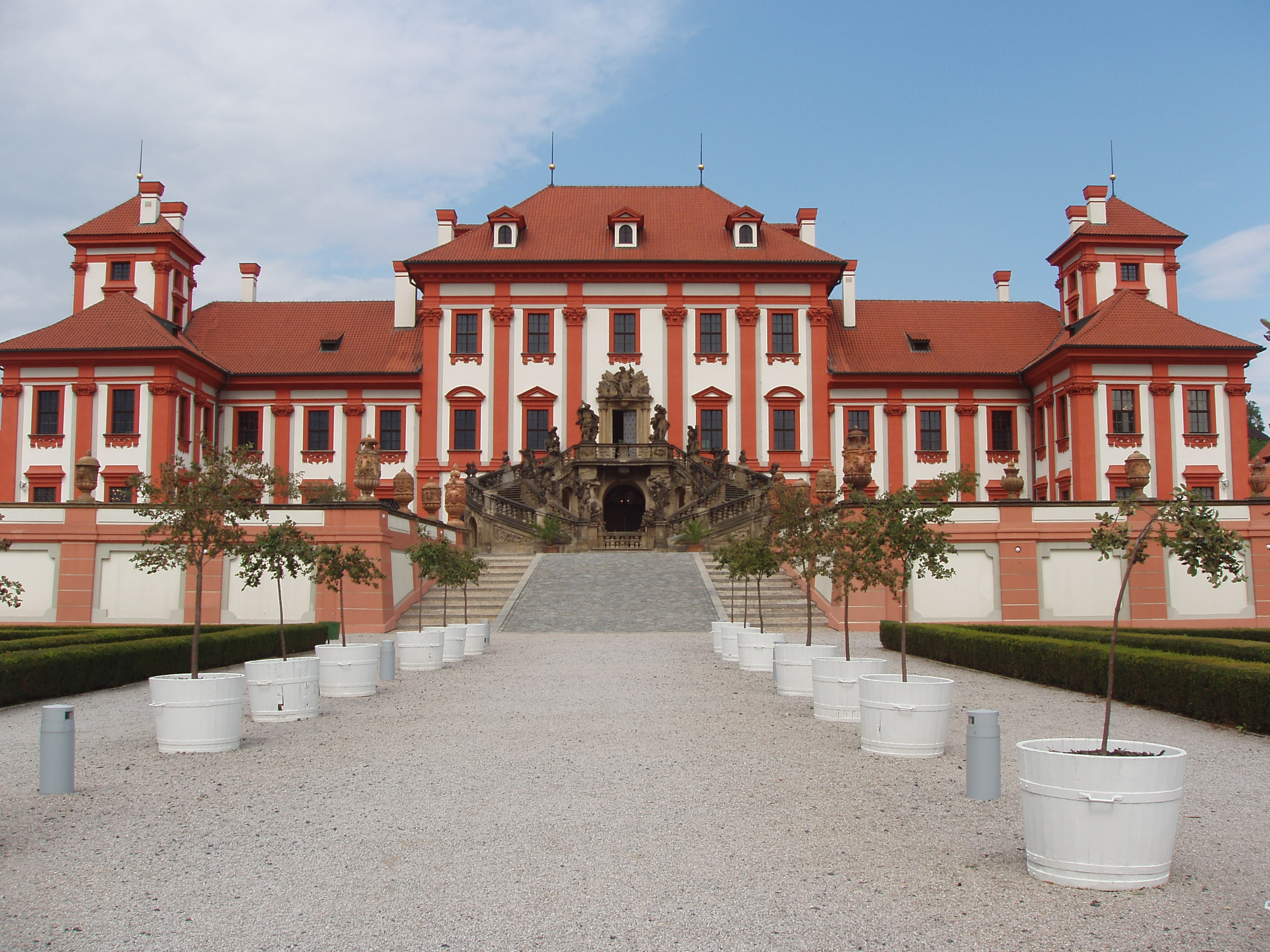 Zámok Trója, Praha (pohľad zo záhrady)